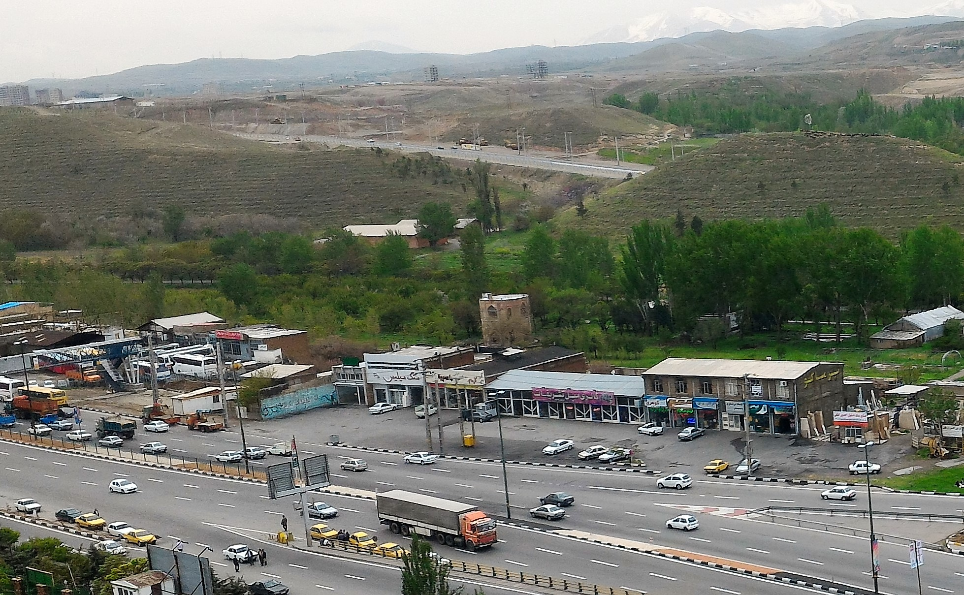 برج خلعت پوشان تبریز